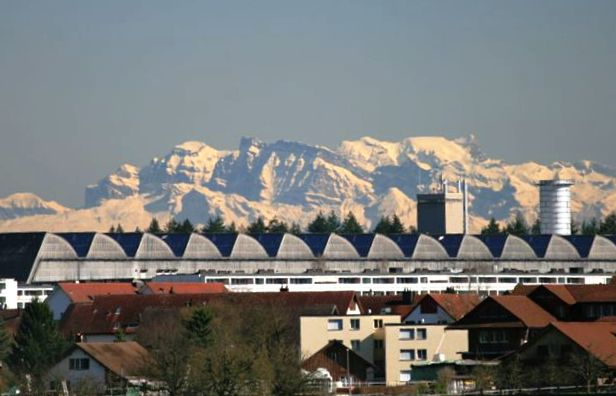 Im Vordergrund Lupfig, danach das Dach der Fabrik von Alstom in Birr und im Hintergrund die Alpen, Schweiz